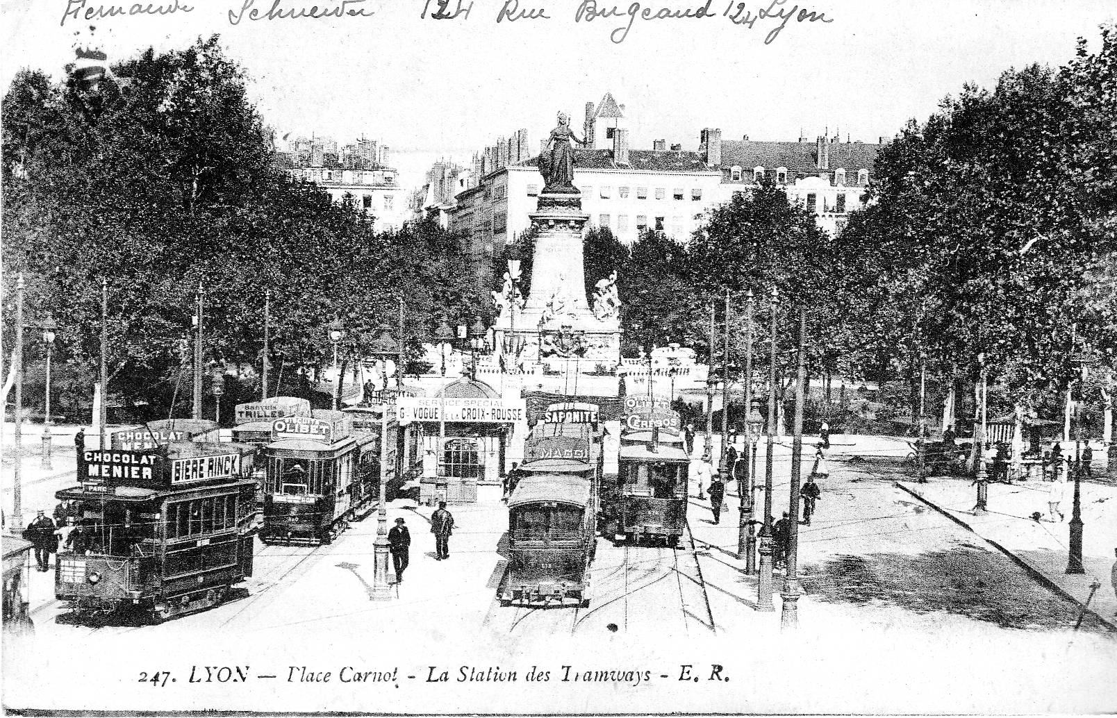 Carte postale ancienne éditée par ER N247 Lyon - Place carnot - Station des Tramways